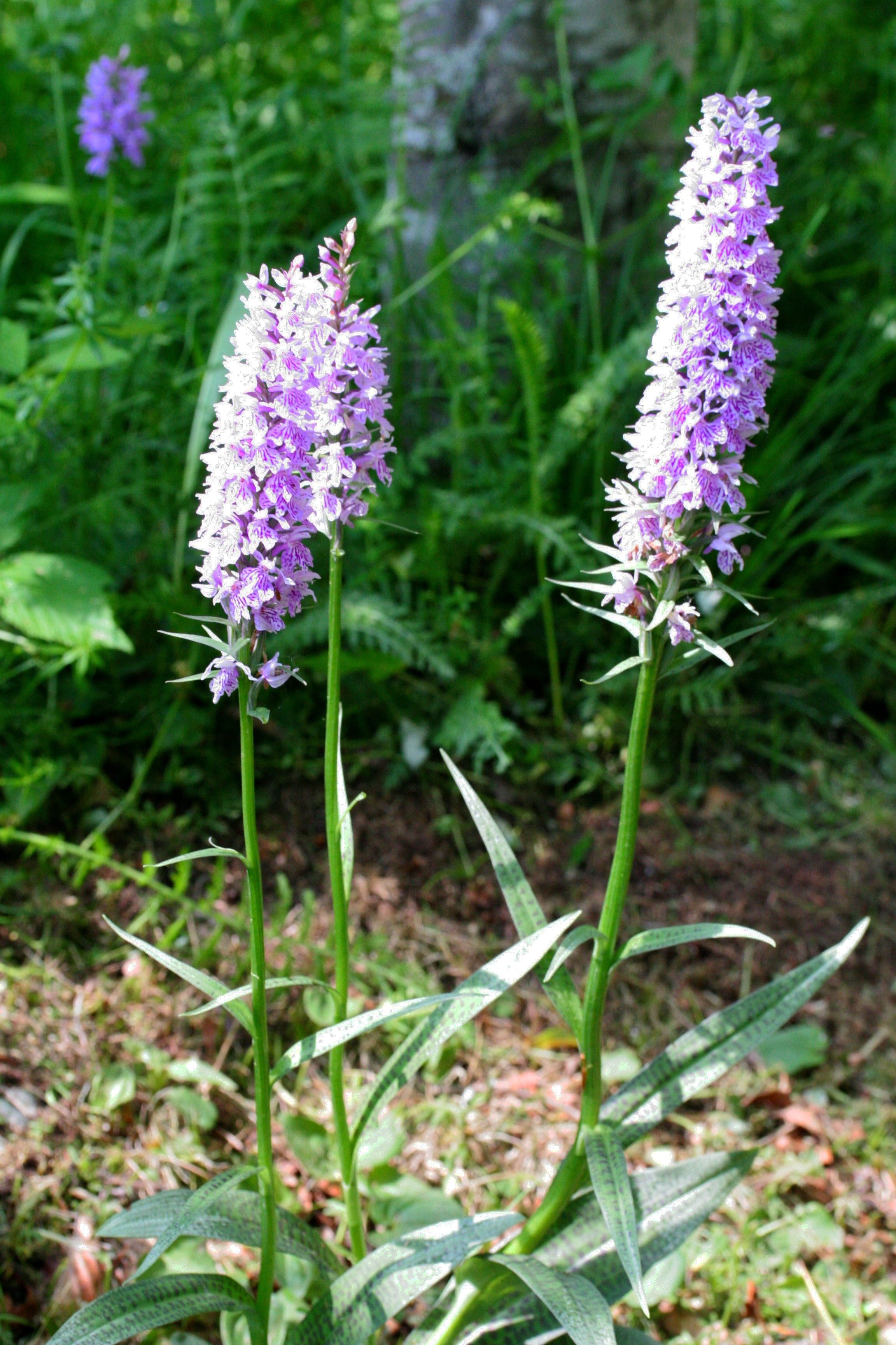 Orchide di Fuchs - Località: Giardino Botanico Alpino "Giangio Lorenzoni", Pian Cansiglio, Tambre d'Alpago (BL), 1000 m s.l.m.